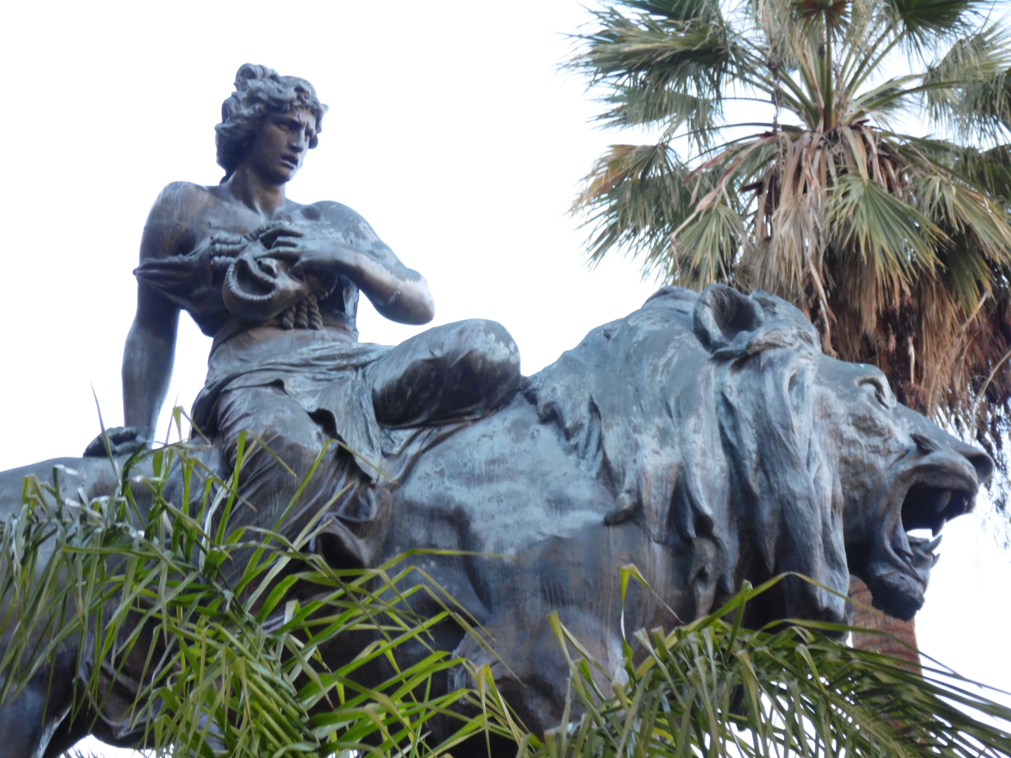 Benedetto Civiletti: La Tragedia. Teatro Massimo (Palermo)